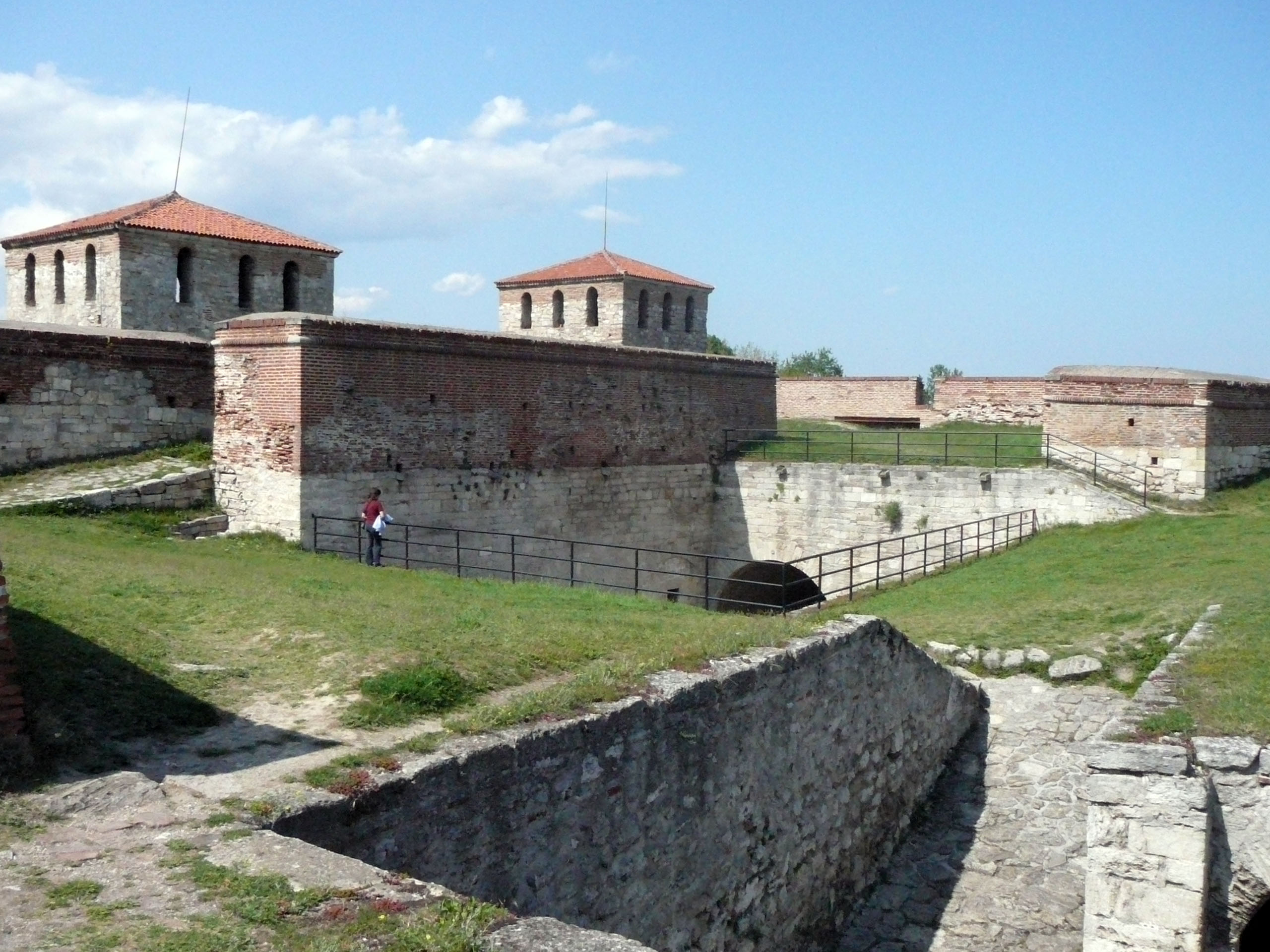 Baba Vida Fortress,Vidin,Bulgaria